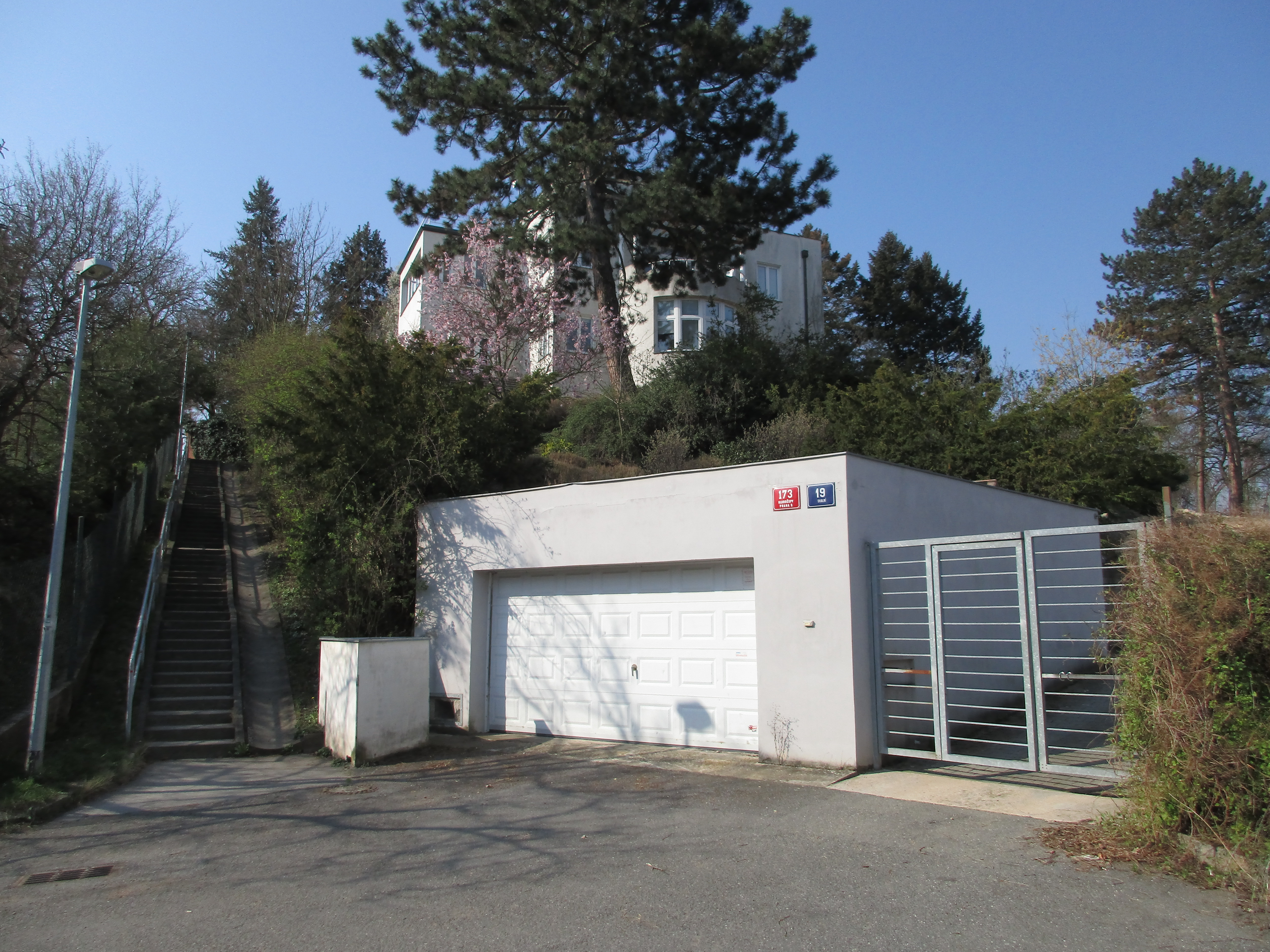 Skalní 173/19, Praha 5-Hlubočepy